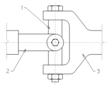 Sprzęgło wychylne (Cardana)